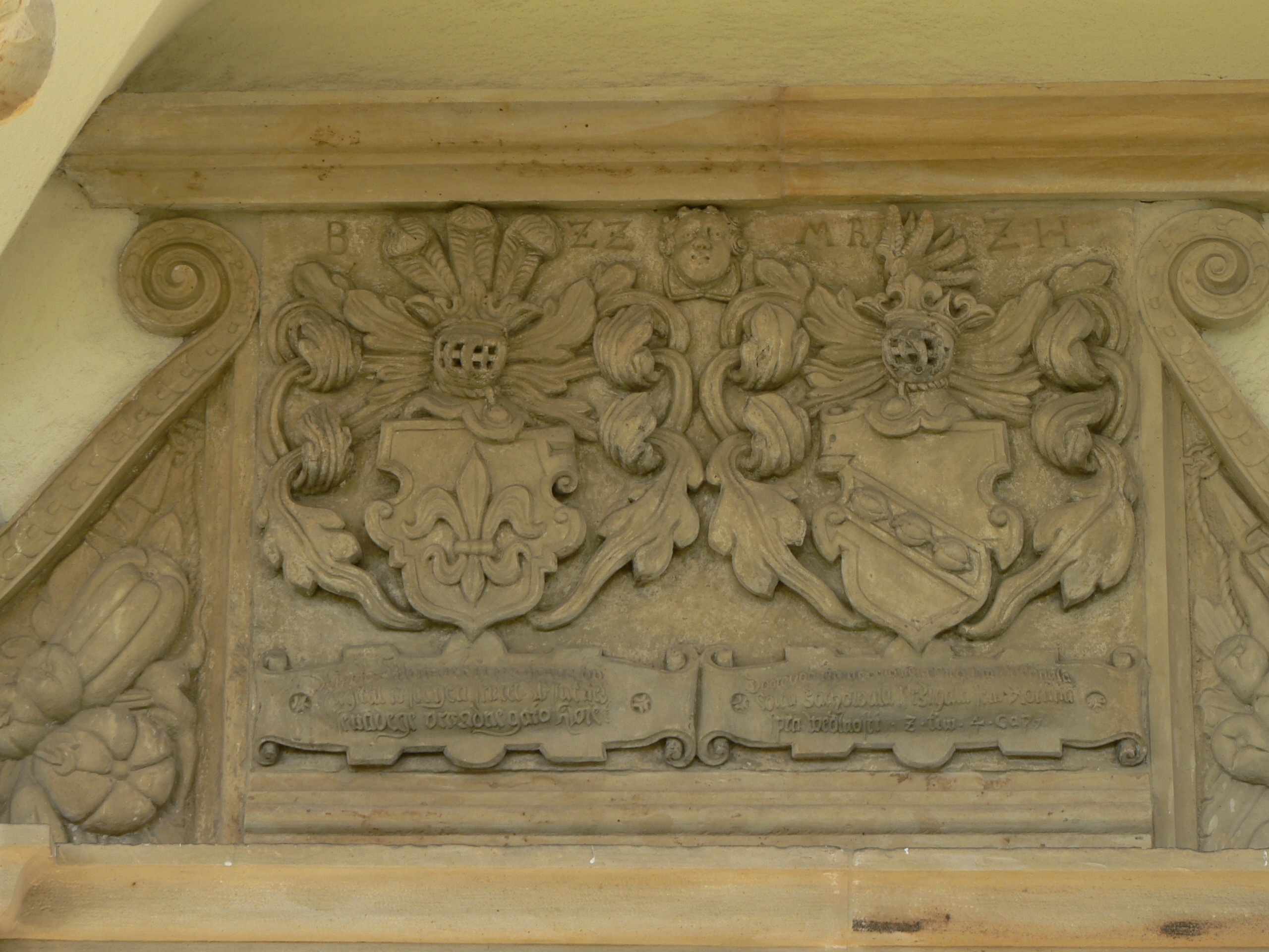 Kostel svatého Martina (Měrotín) - renesanční reliéfní znak stavitele Bernarda ze Zástřizl a jeho manželky nad jižním vstupním portálem (1619).